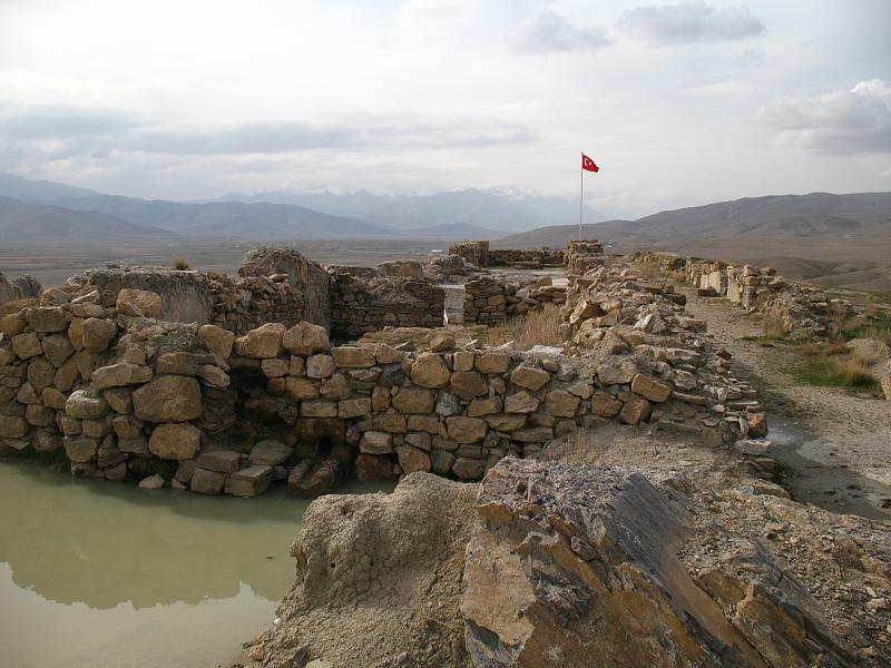 Urartian fort in Çavuştepe